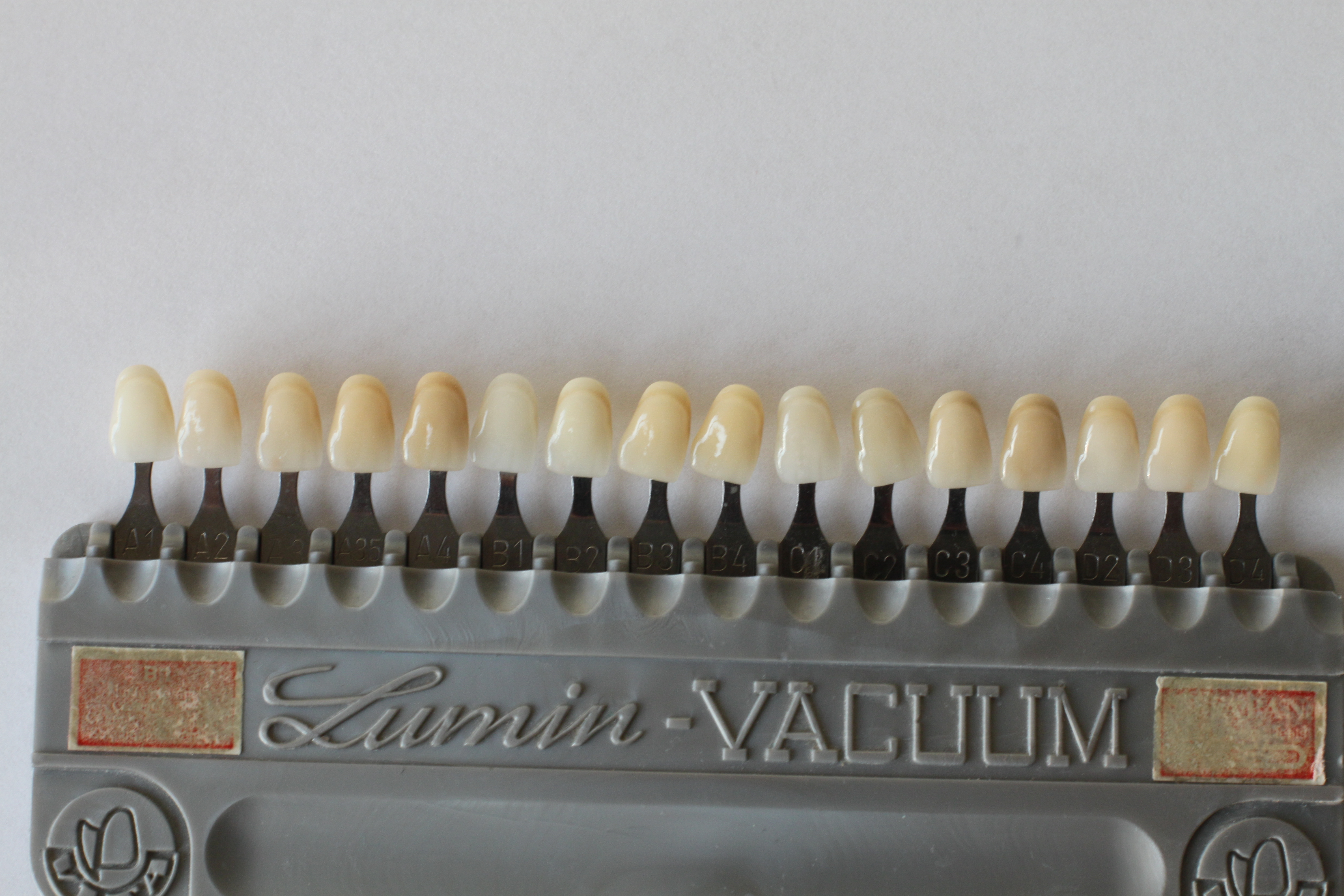 Farbring zur Bestimmung der Zahnfarbe